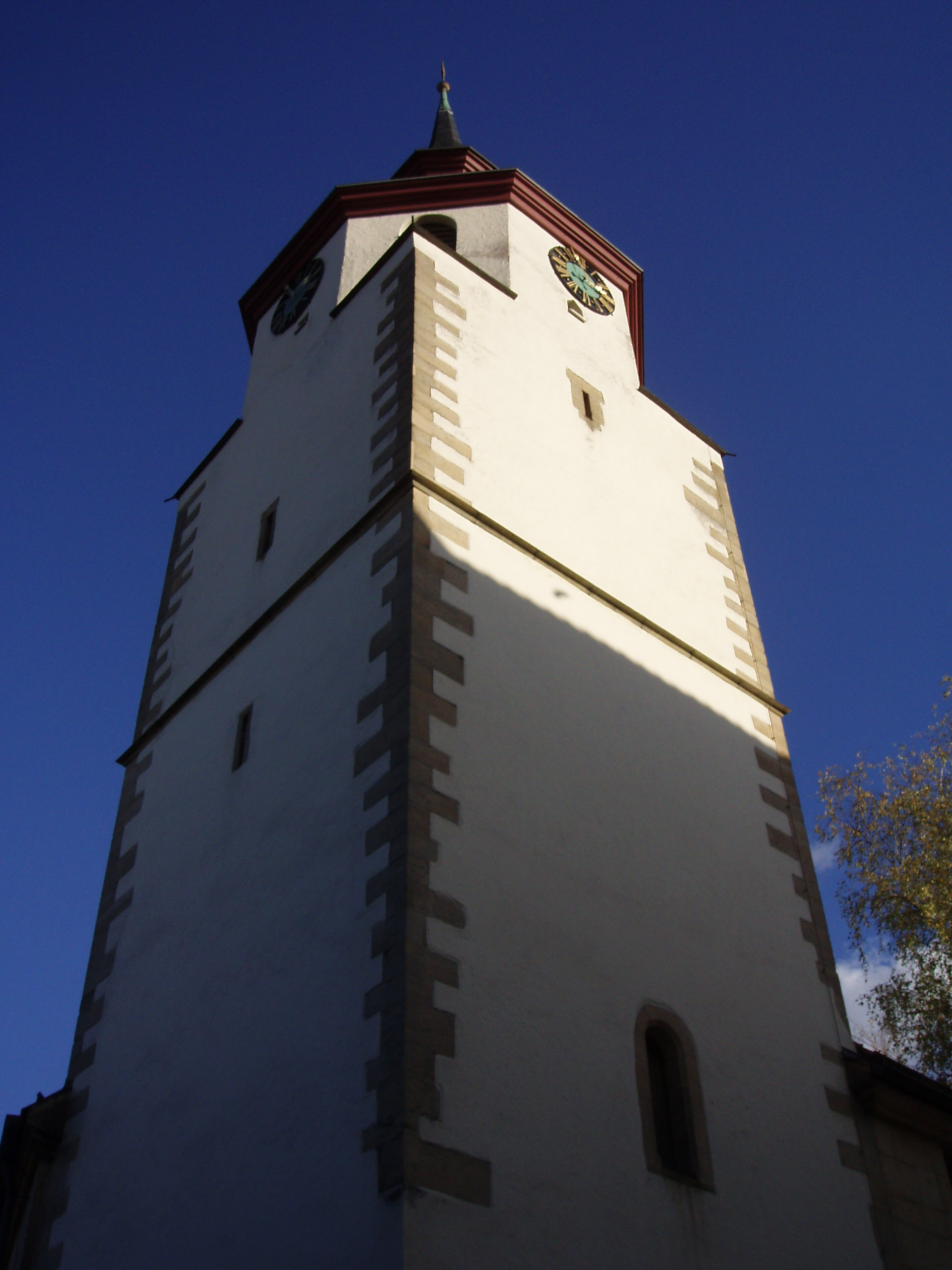 Turm der Waldenburger Stadtkirche